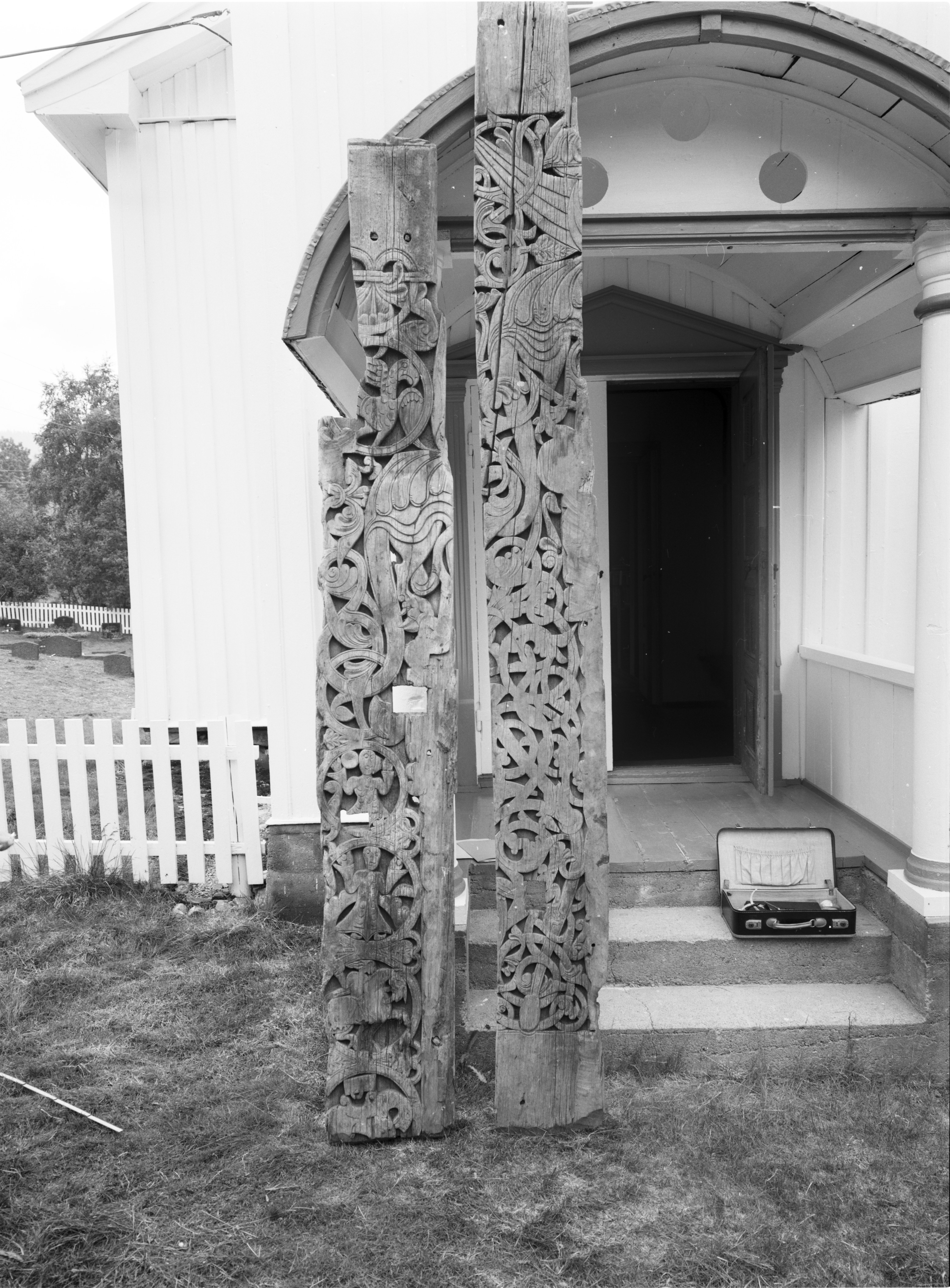 Portalplanker fra Nesland stavkirke (revet). Ukjent fotograf. Fra Kulturhistorisk museums samling i Unimus (jf. søk).